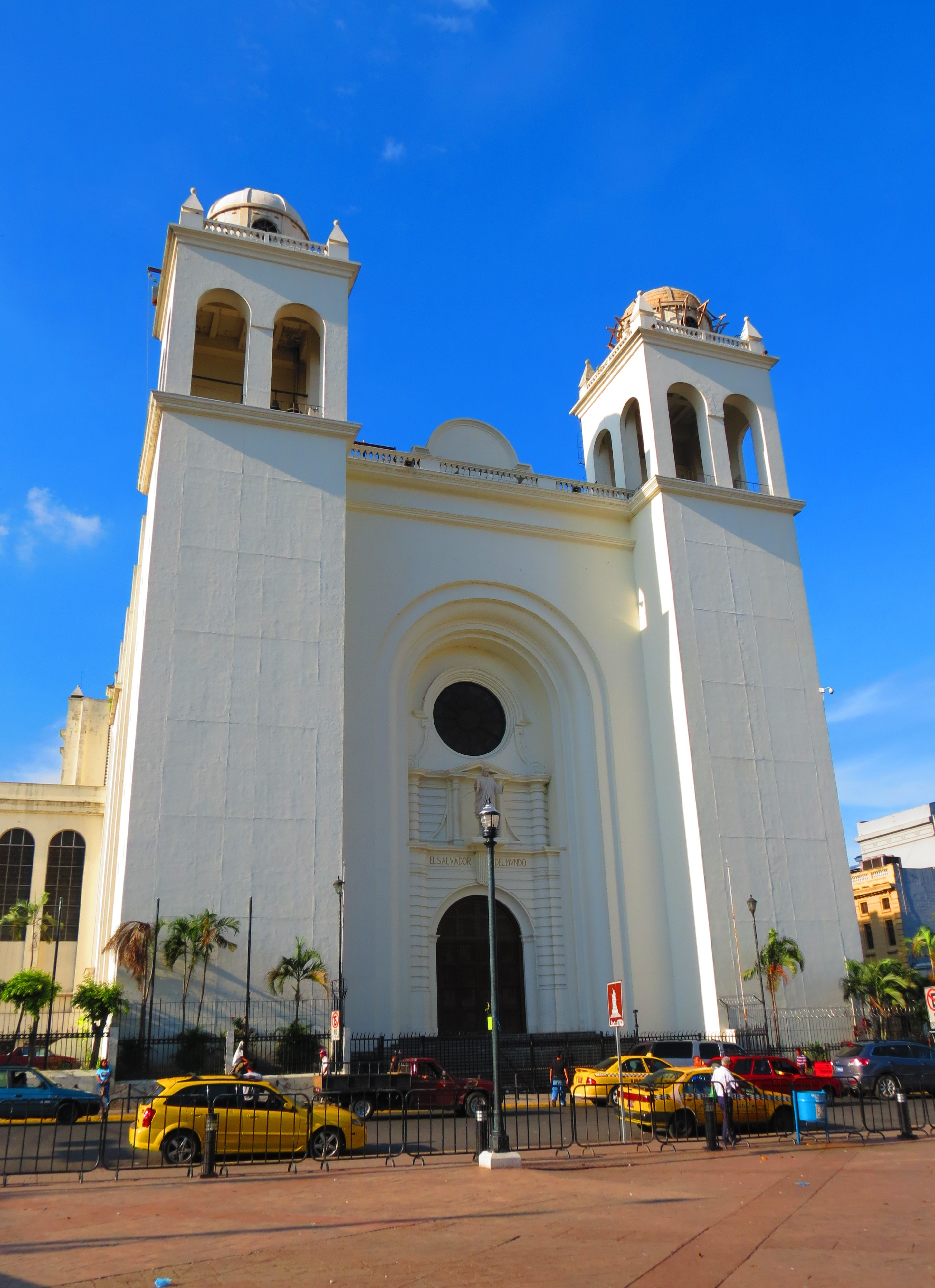 Iglesia principal de la arquidiócesis católica de San Salvador.